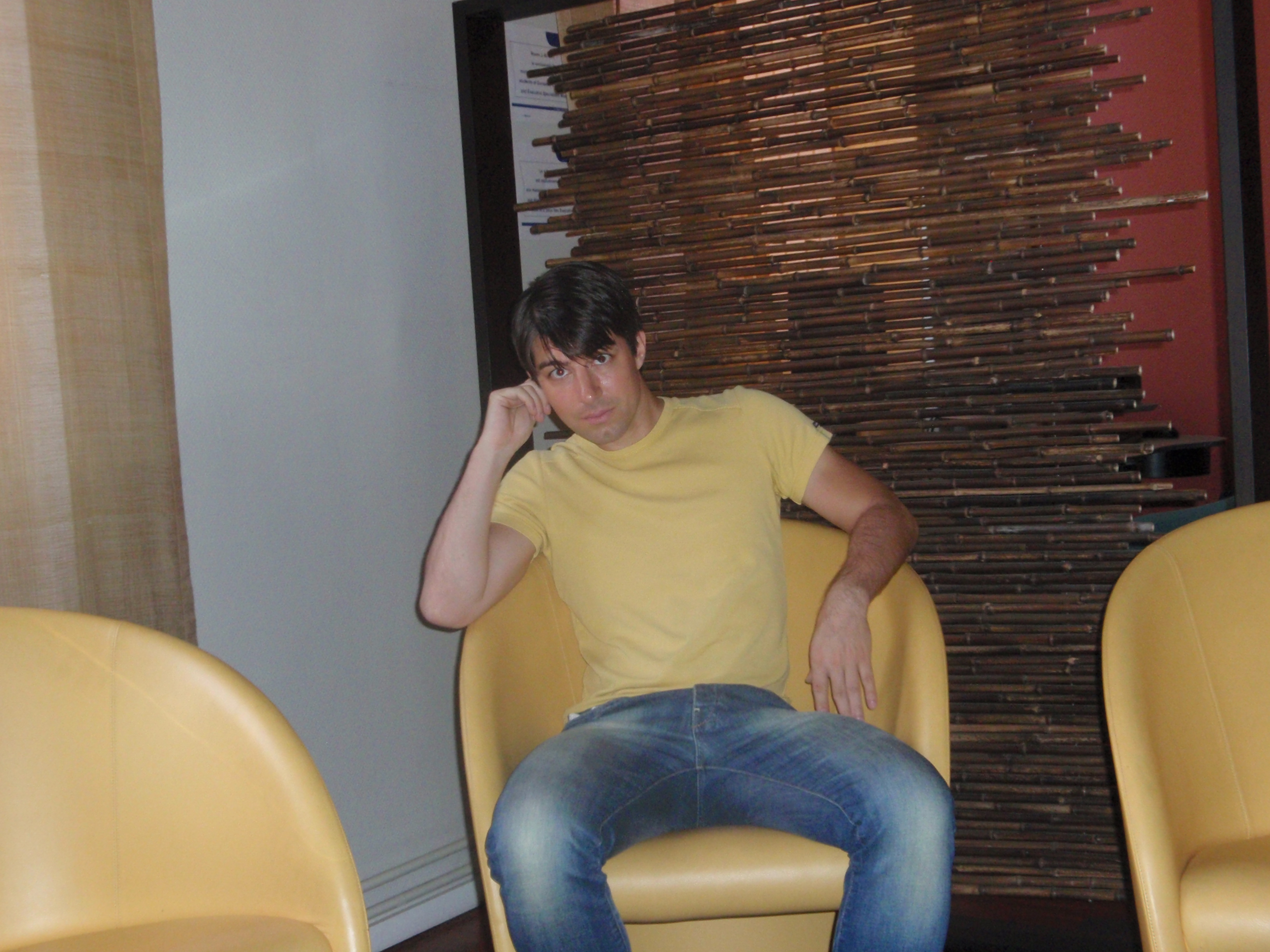 Andreas Kaplan